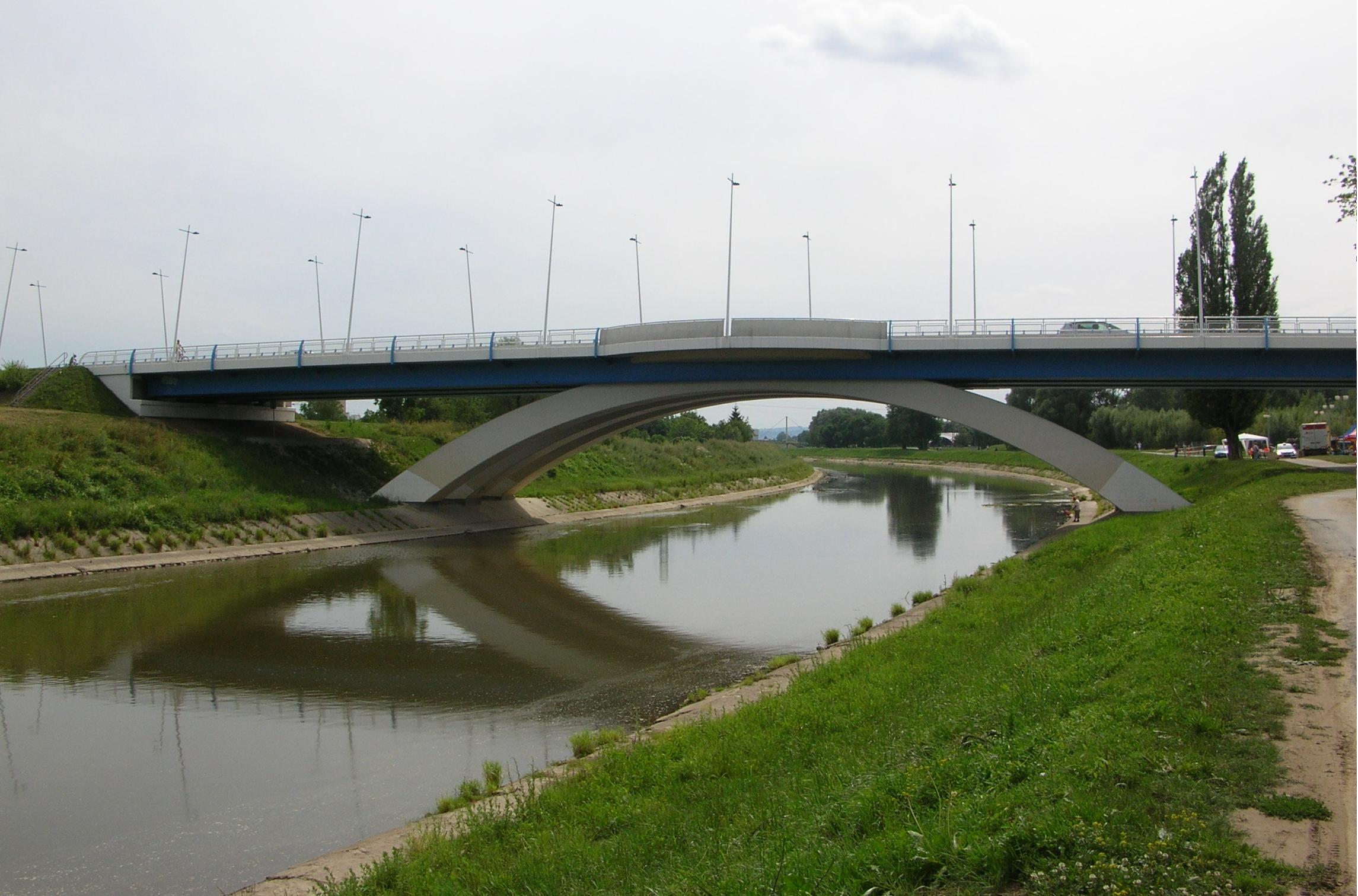 Zamokowy bridge